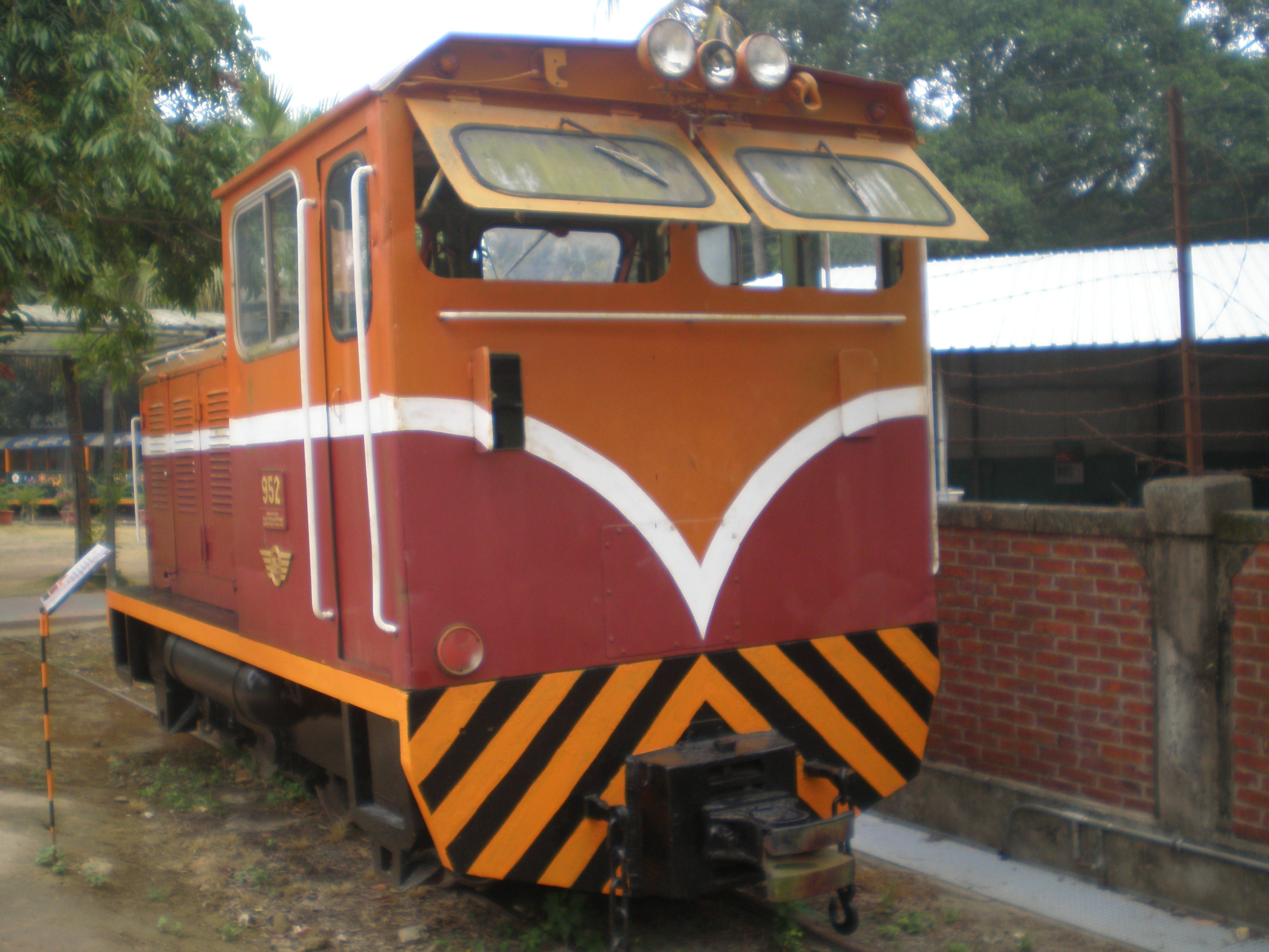 靜態展示於烏樹林糖廠的952號金馬牌內燃機車